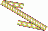 Gwiazda Afganistanu. Wstążka.l